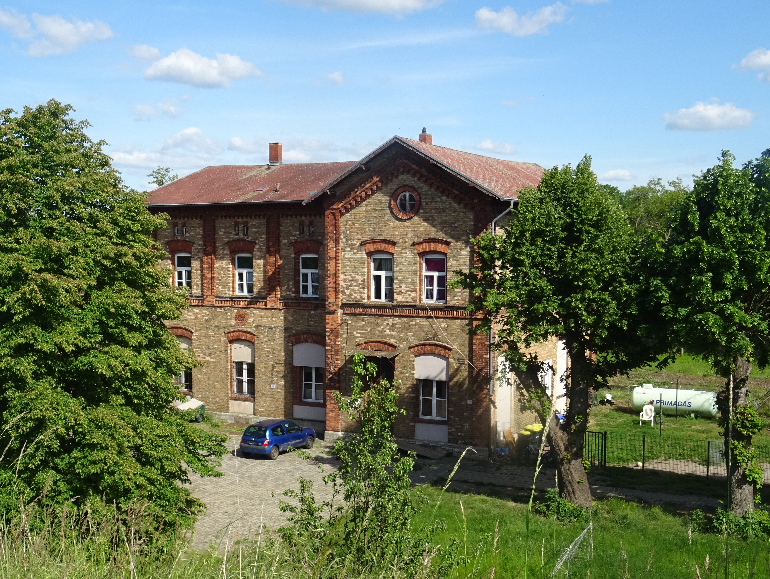 Belleben, denkmalgeschütztes ehemaliges Bahnhofsgebäude